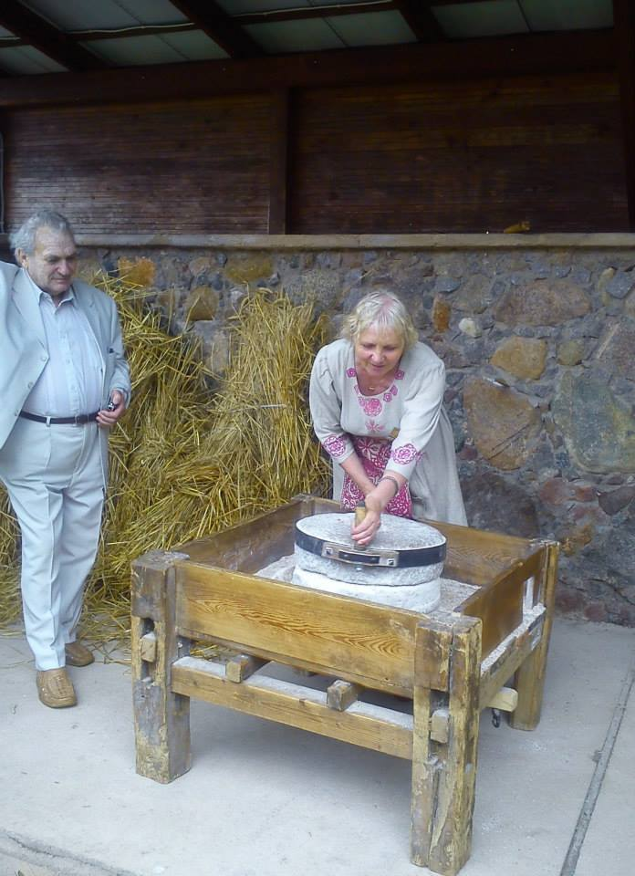 Pokazy dawnych technik, rękodzieła; skansen - Muzeum Rolnictwa/Eesti Põllumajandusmuuseum, Estonia